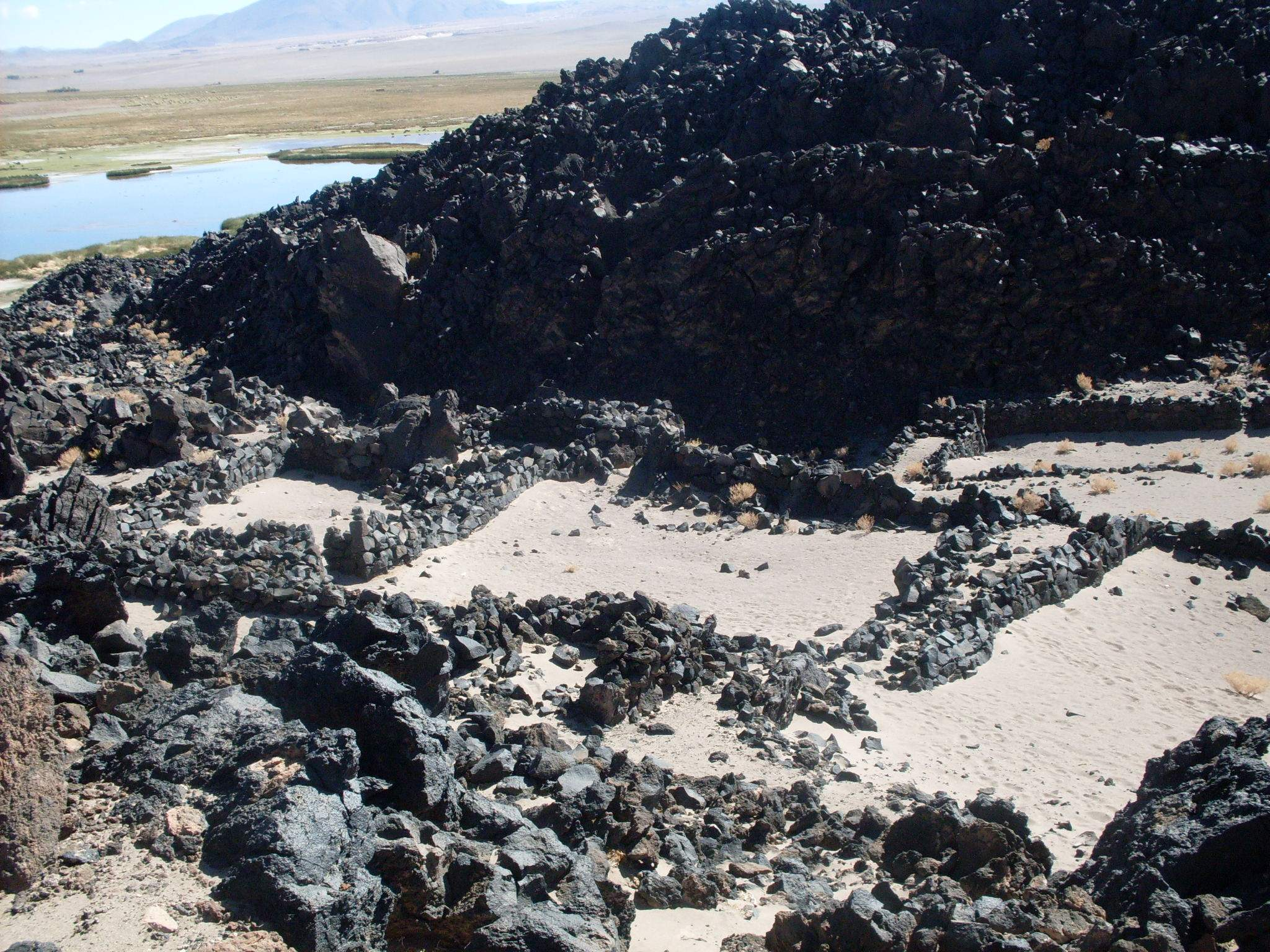 Pucará de la Alumbrera, Antofagasta de la Sierra, Provincia de Catamarca, Argentina.